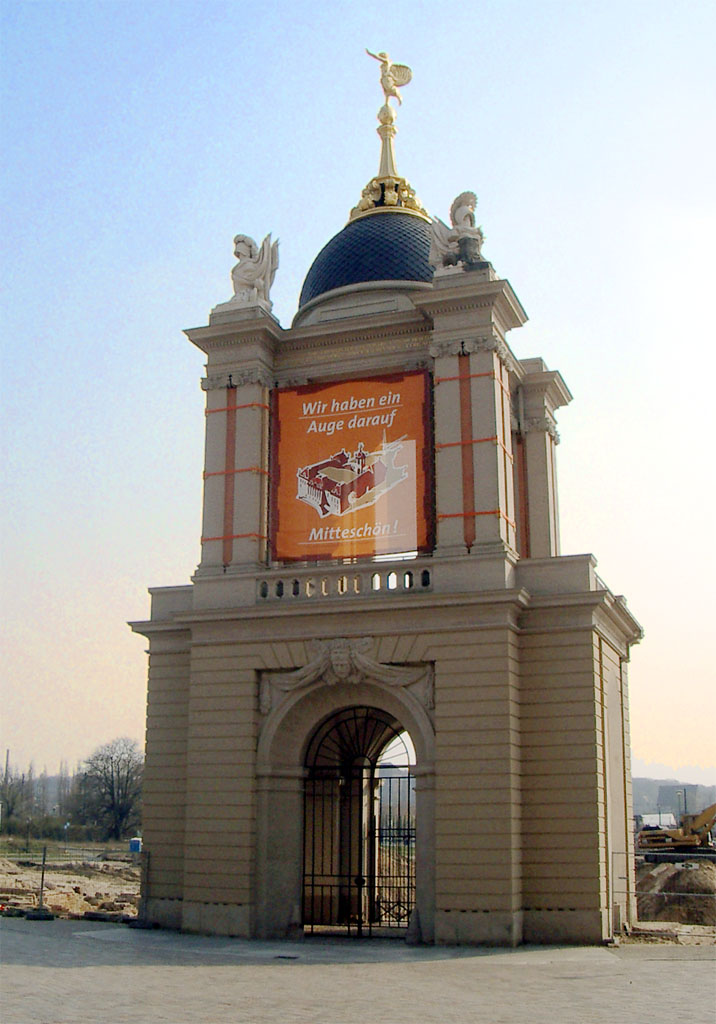 Das Fortunaportal als Eingang des ehemaligen Stadtschlosses in Potsdam 2007. Im Hintergrund finden Ausgrabungen über das Stadtschloss statt.